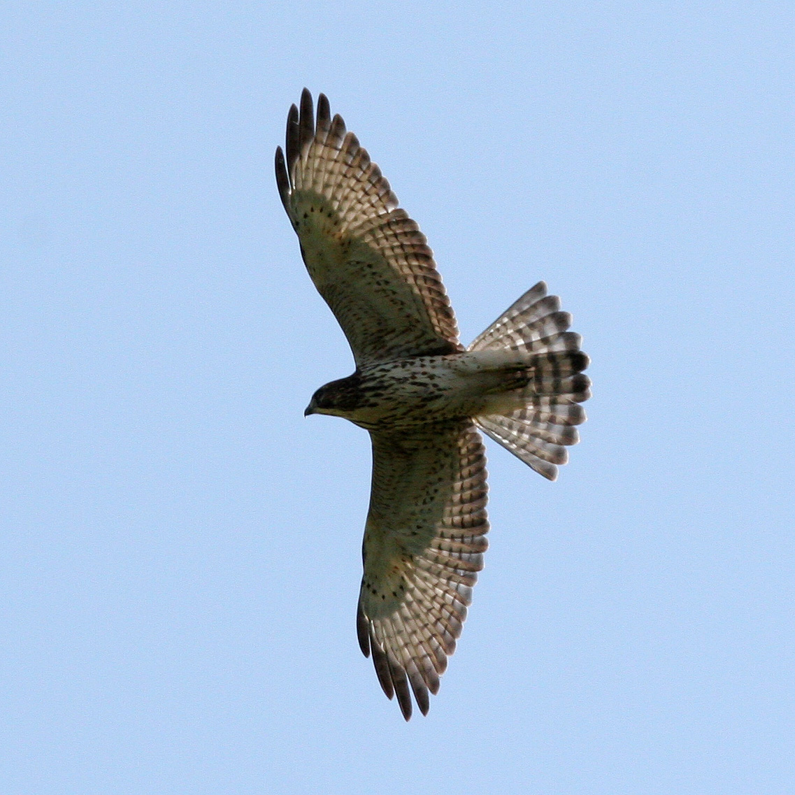 hawk